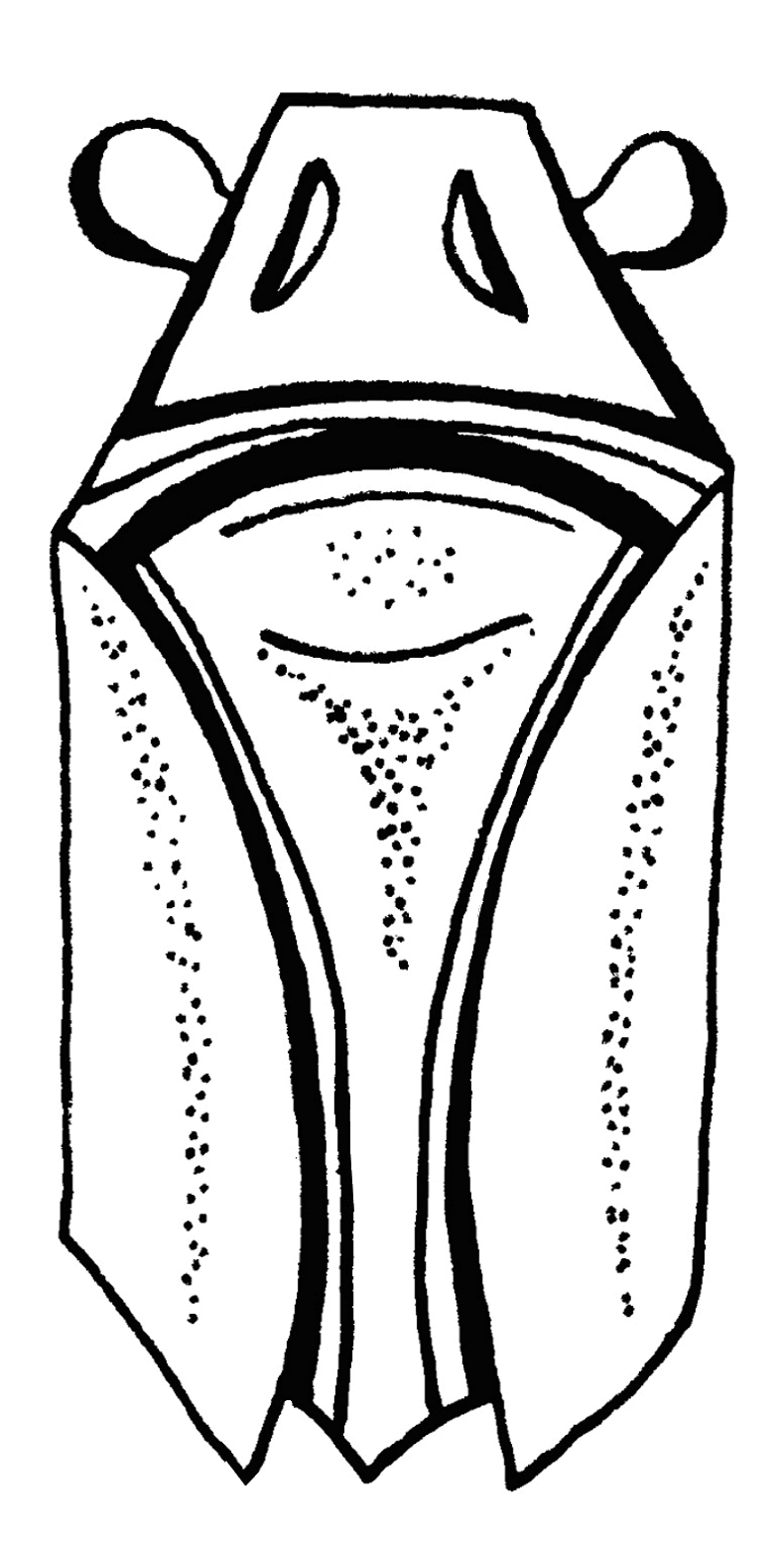 Singzikaden in der Kultur: Zeichnung einer aus brauner Jade gefertigten „Zungenzikade“ der Han-Dynastie (206–220 v. Chr.); solche Figuren wurden auf die Zunge von Verstorbenen gelegt, vermutlich in der Hoffnung auf deren Wiedergeburt.